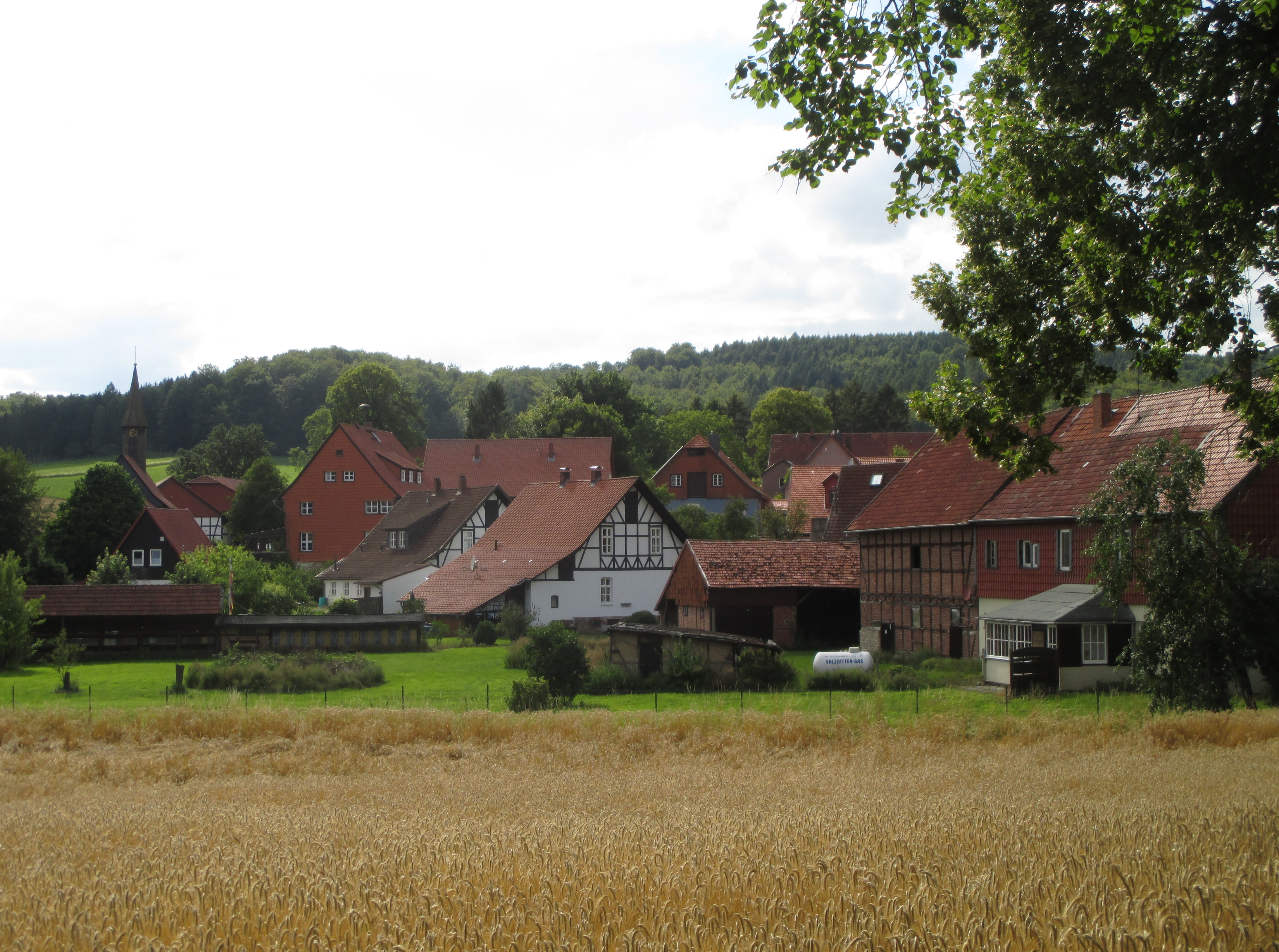 Blick auf das Stadtdorf Uehrde, Stadt Osterode am Harz